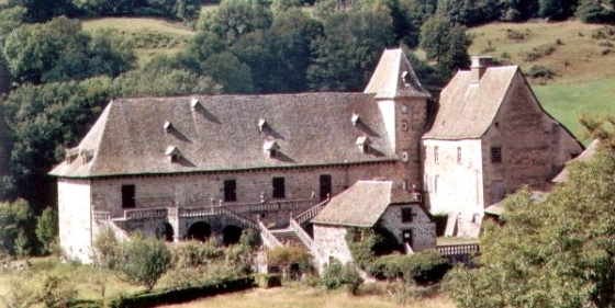 Chateau de Cropières Raulhac (15)